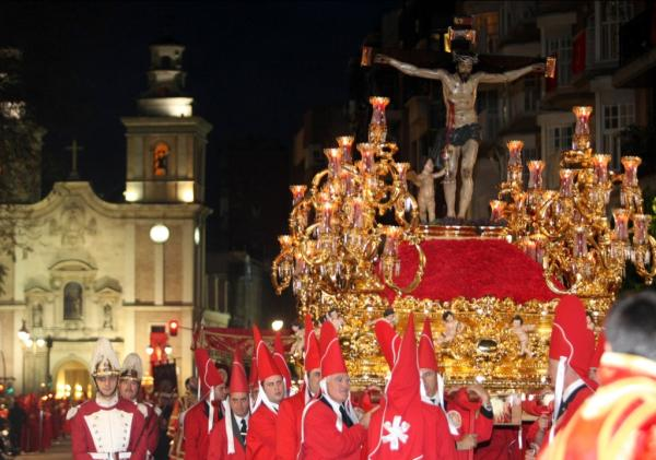 Cristo de la Sangre (Nicolás de Bussy 1693), titular de los Coloraos (Murcia)